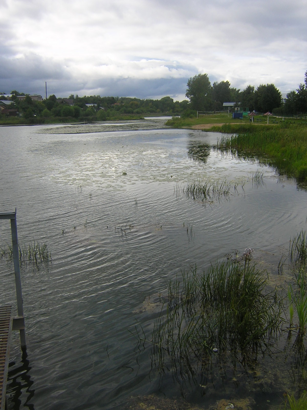 Река Мстёрка во Мстёре